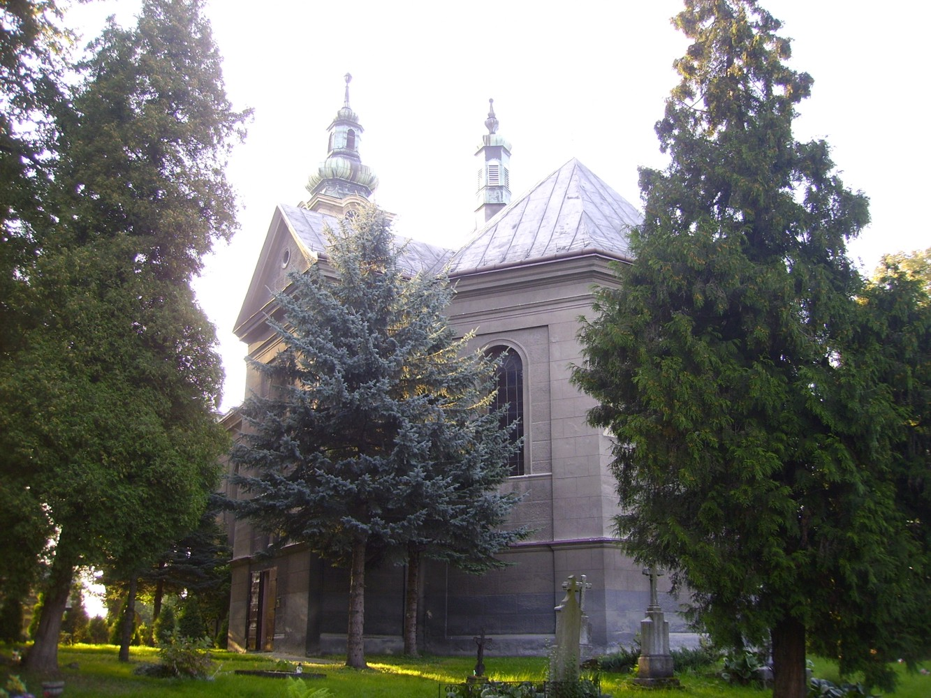 Kościół parafialny p.w. św. Katarzyny w Czechowicach-Dziedzicach